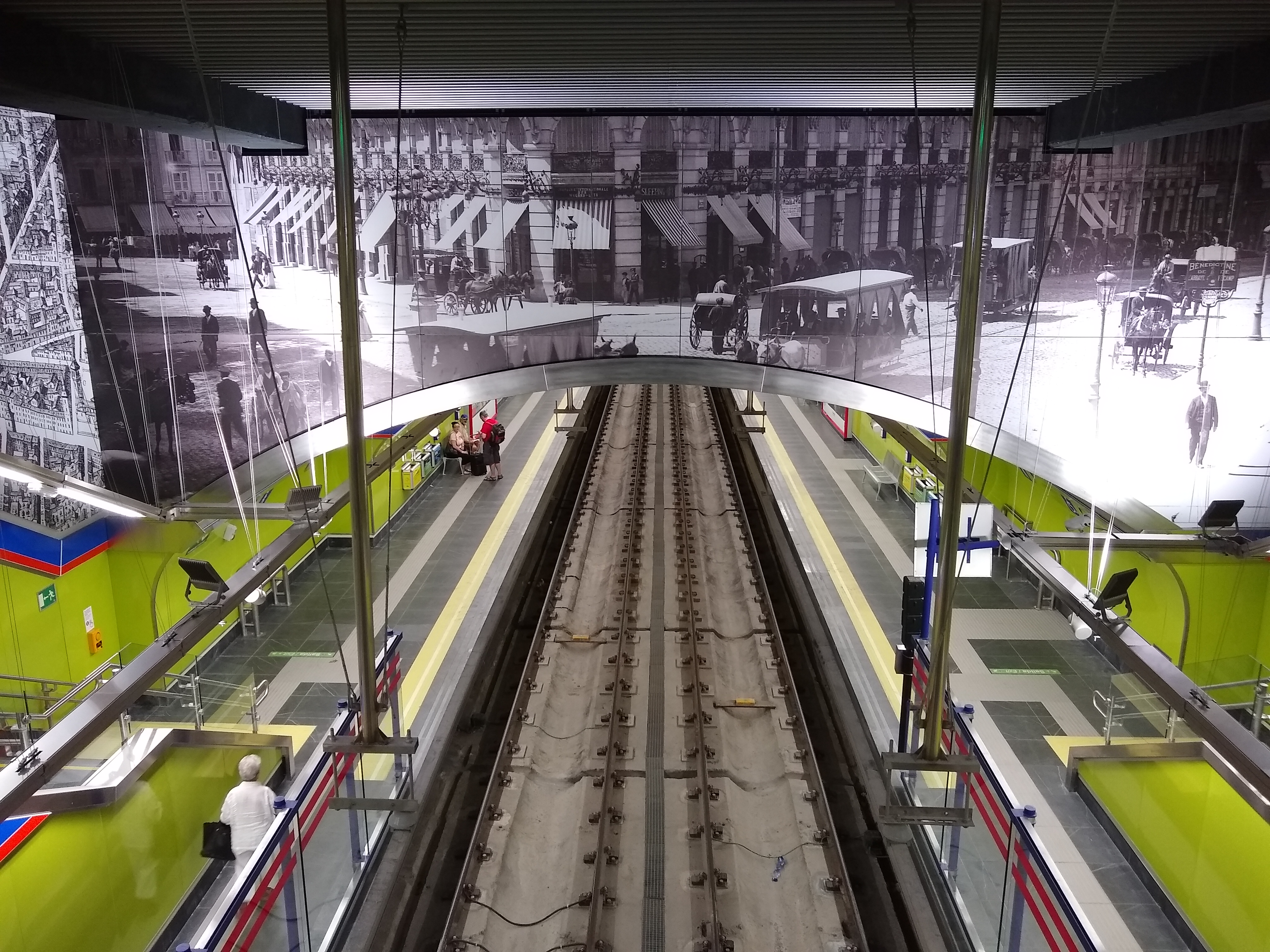 Andenes de la estación de Sevilla (línea 2 del metro de Madrid) tras su reforma